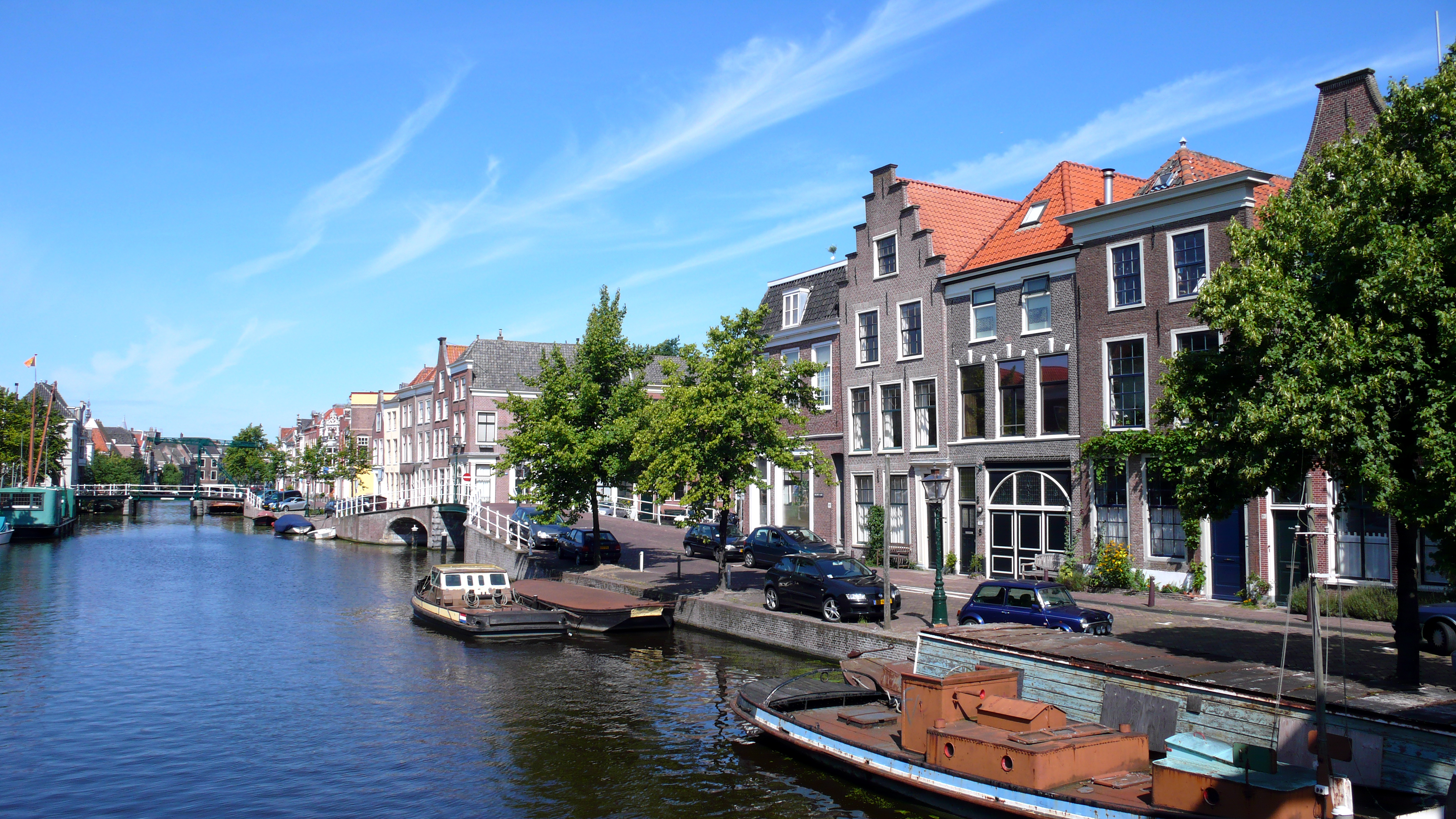 Hogewoerd, Leiden categorie:afbeelding Leiden